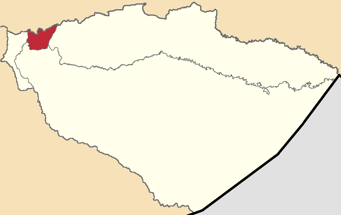 Mapa localizador del cantón en Pastaza, Ecuador